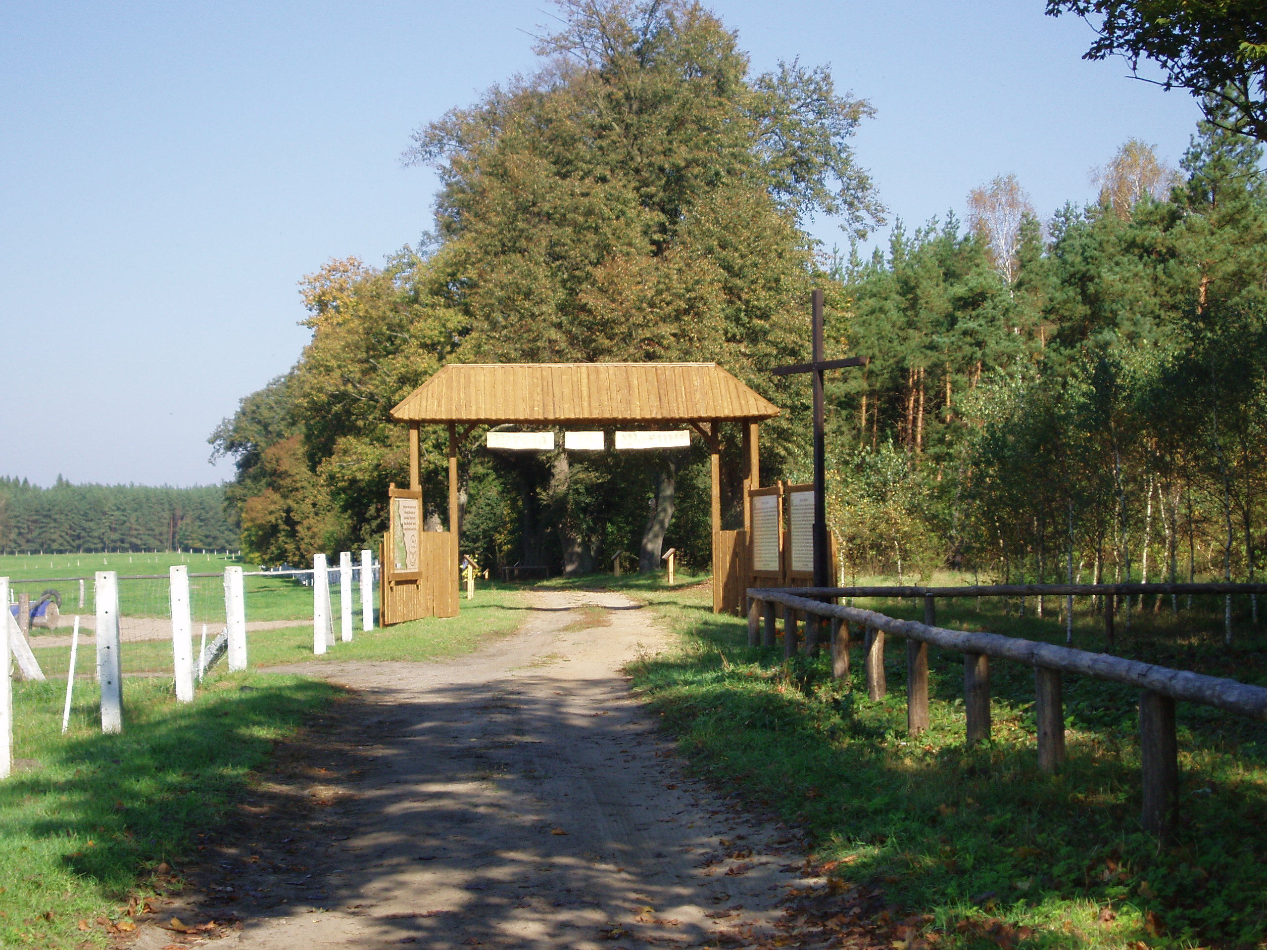 Aleja Biskupów w Bałdach